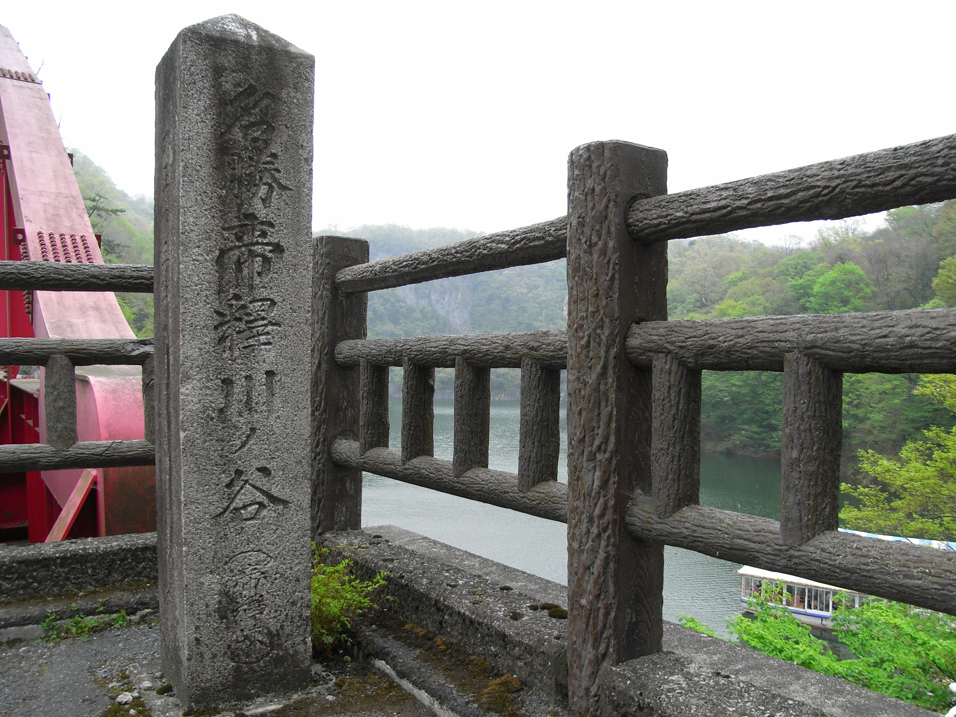 Lake